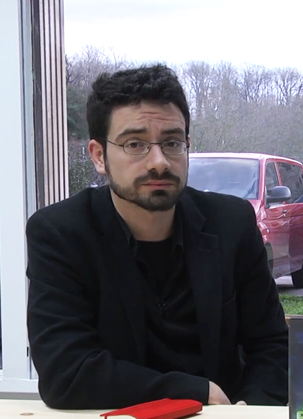 Carlo Padial